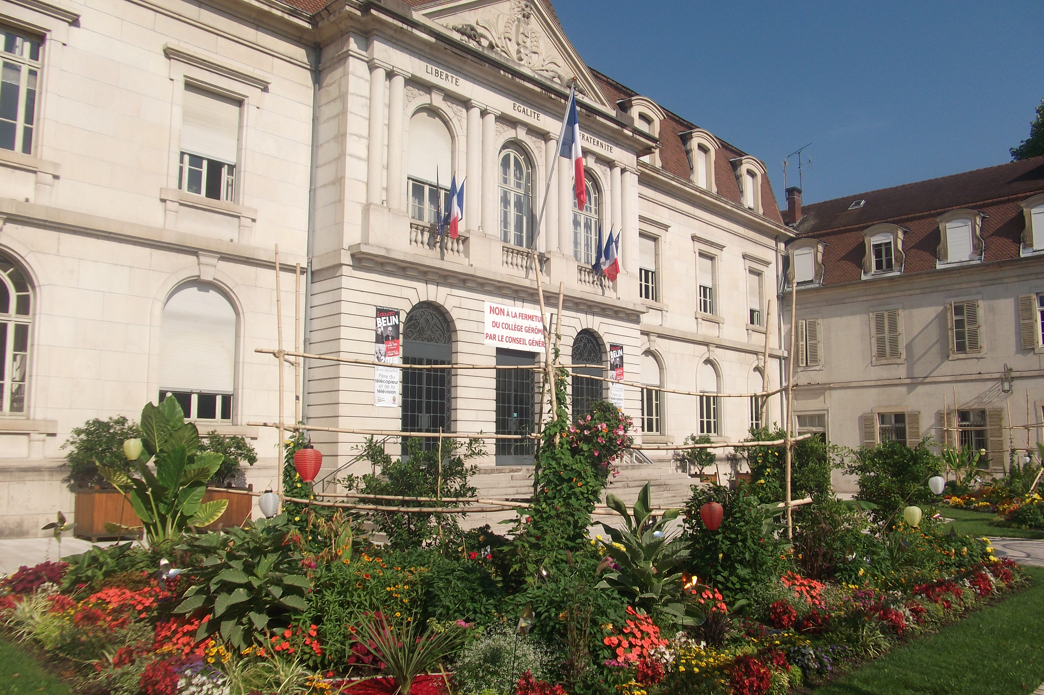 La mairie de Vesoul (Haute-Saône, Franche-Comté)